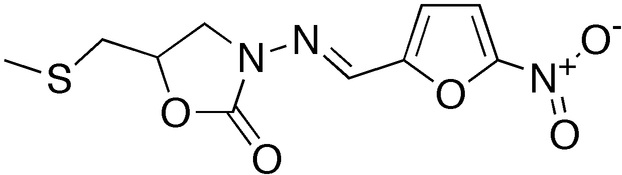 Skeletal formula of nifuratel.